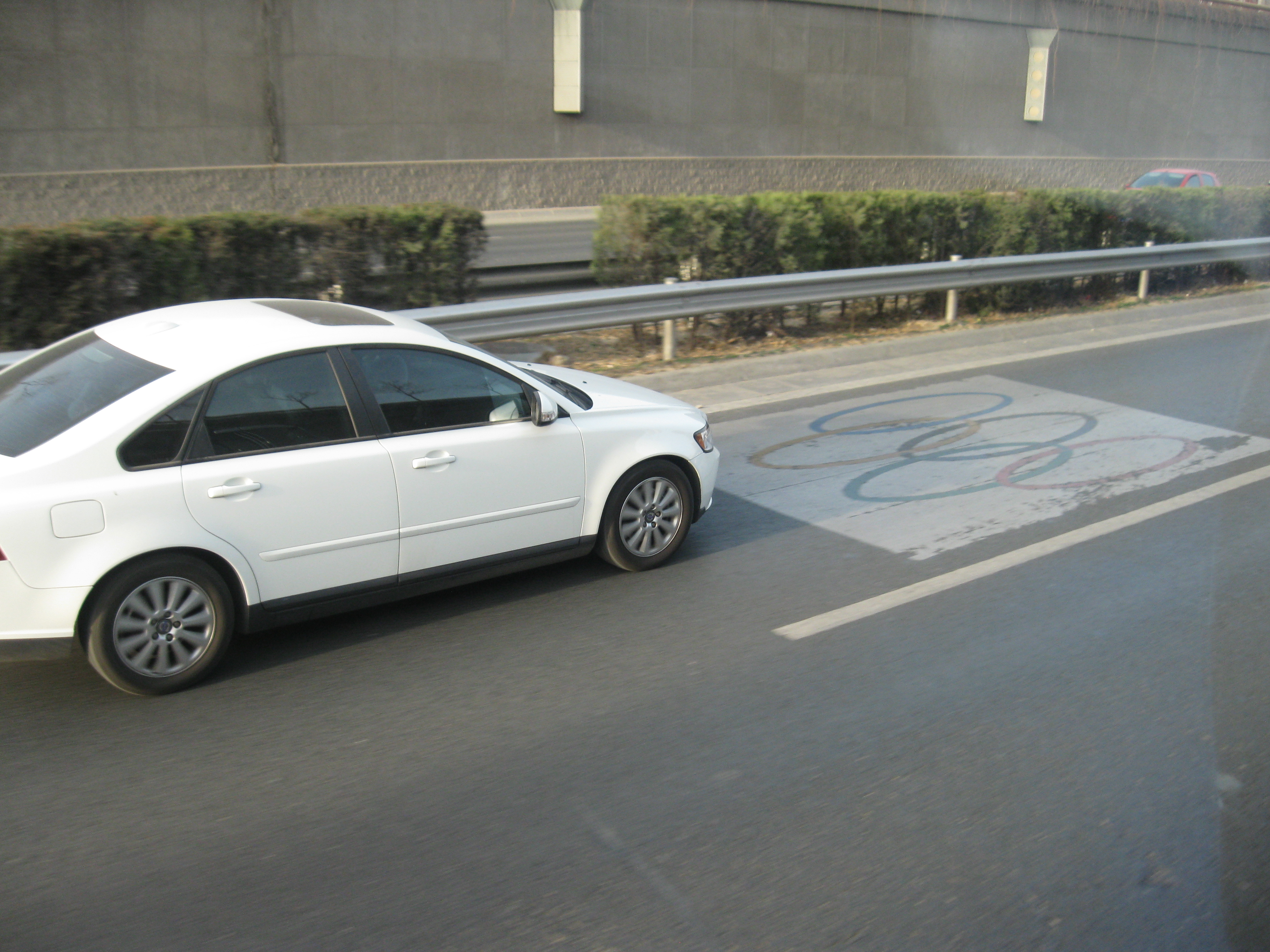 נתיב תחבורה מיוחד לרכבי האולמפידה באולימפיאדת בייג'ינג (2008)